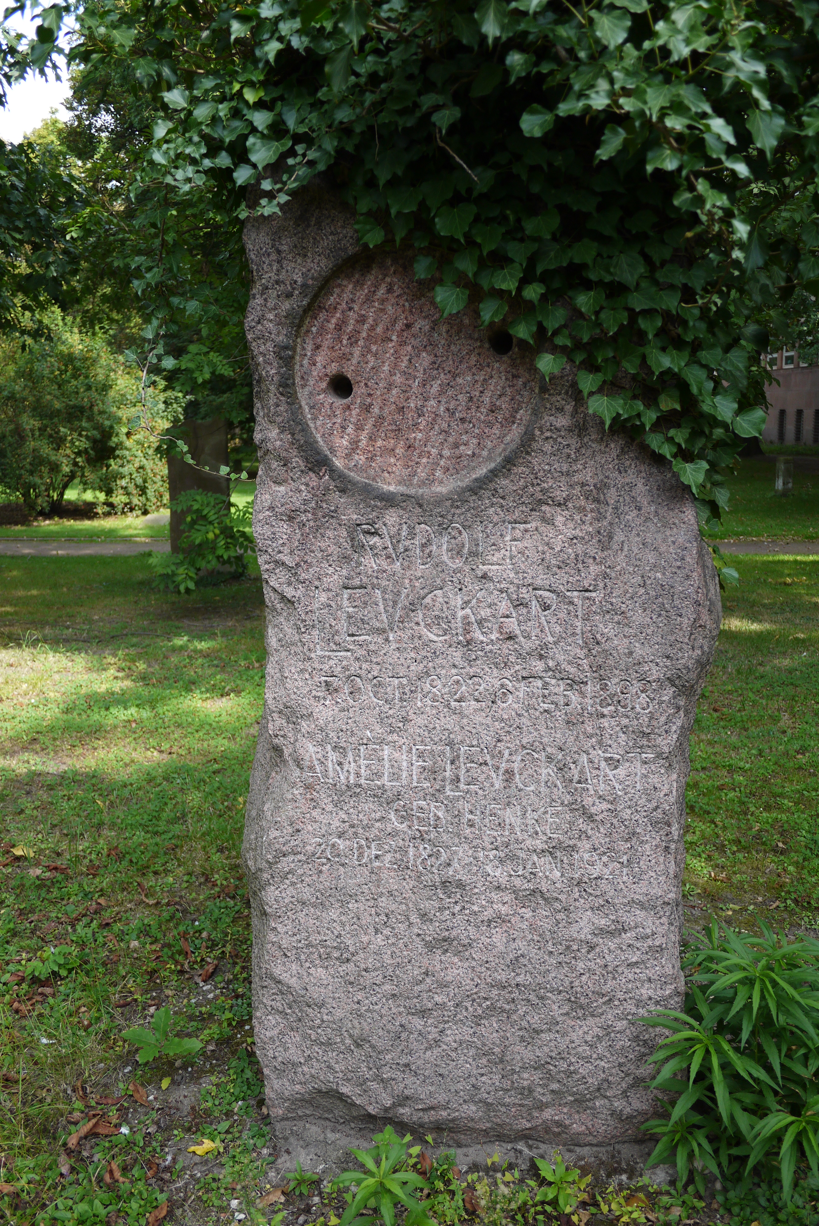 Standort des Grabsteines: Alter Johannisfriedhof in Leipzig, das originale Grab im Neuen Johannisfriedhof wurde zerstört.